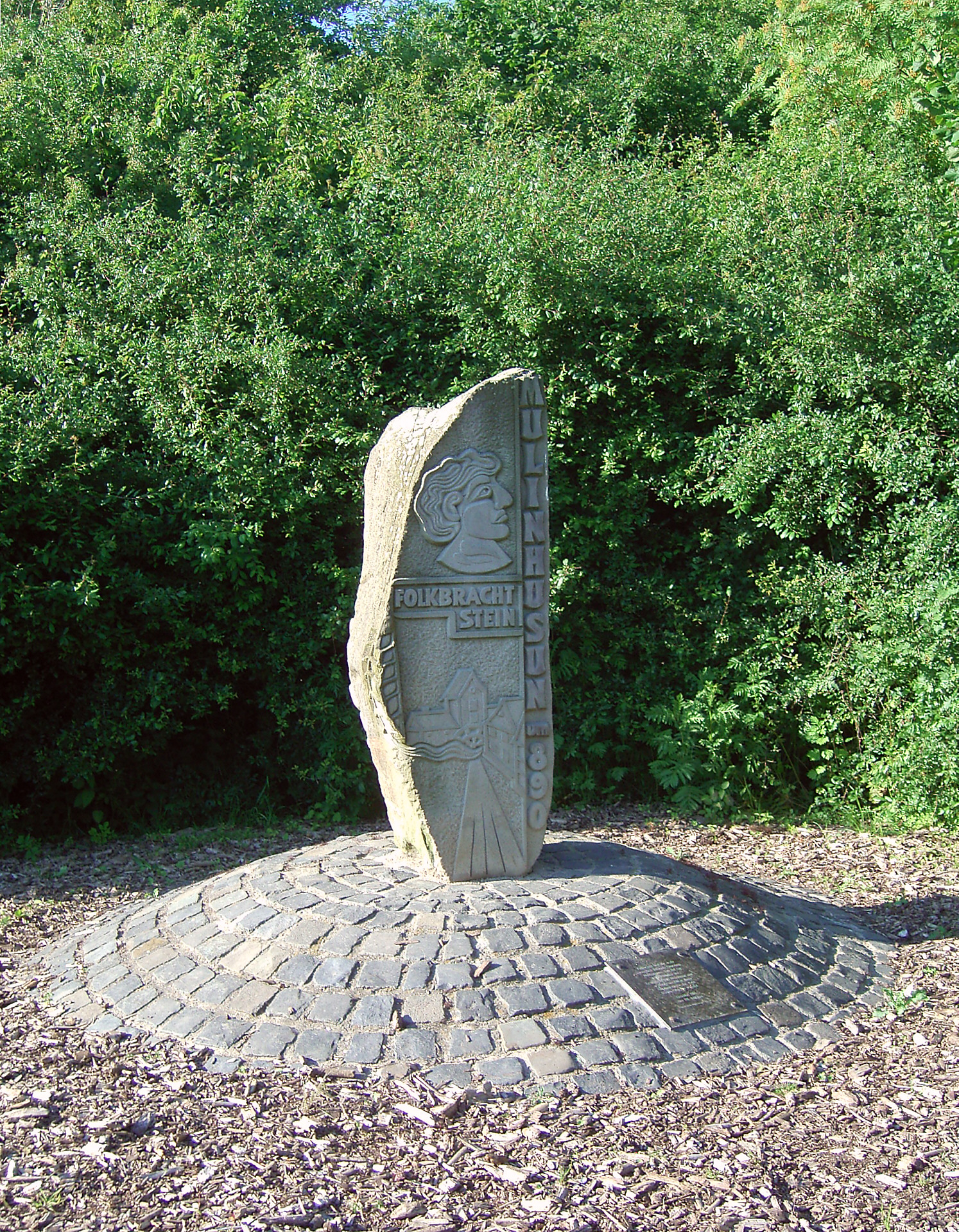 Der Folkbrachtstein in Unna-Mühlhausen erinnert an die erste urkundliche Erwähnung des Stadtteils